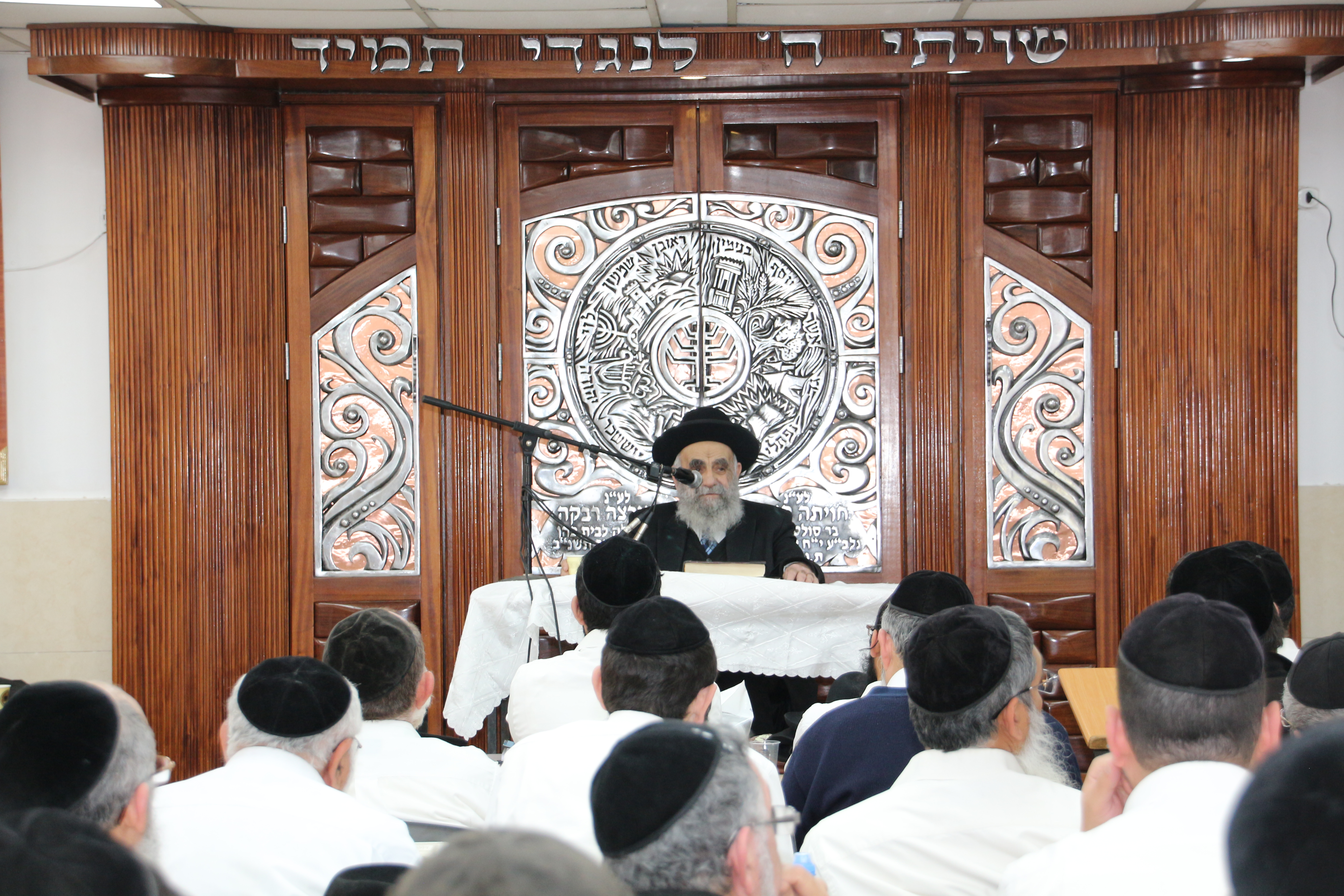 הרב משה צדקה מוסר שיעור בישיבת בין הזמנים פסח של הרב נתן בוקובזה ז"ל בנתיבות